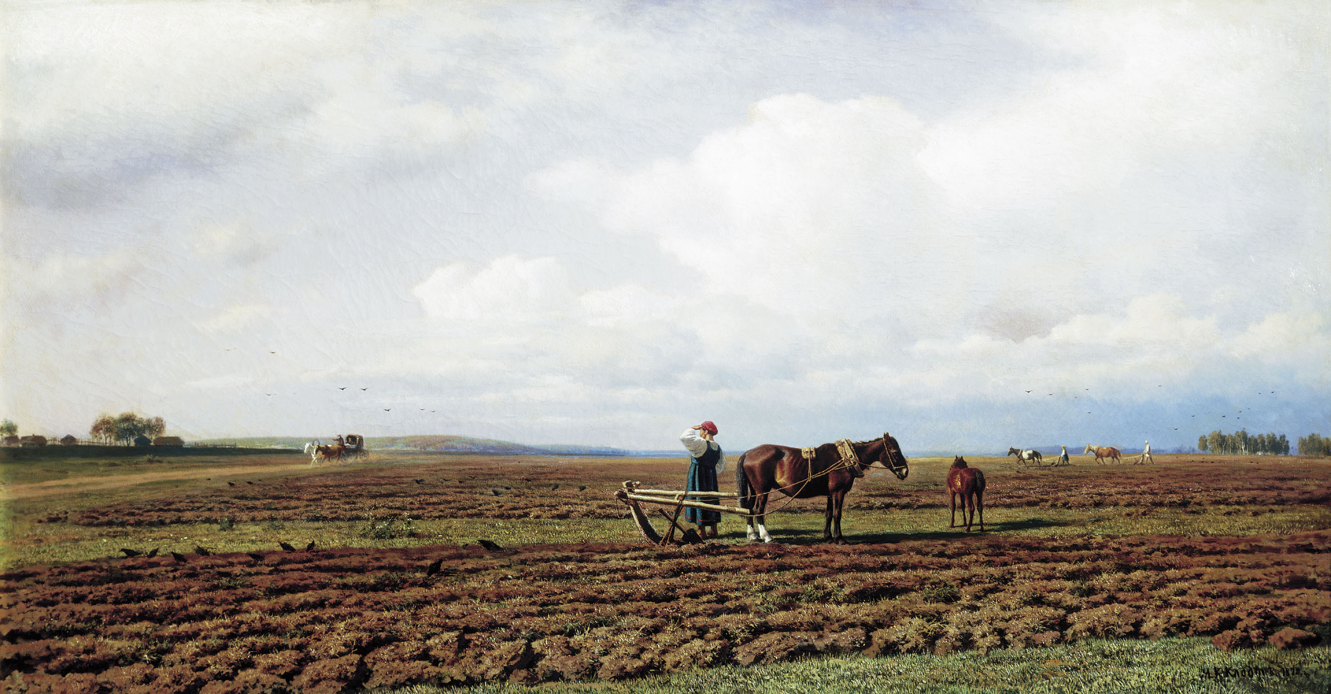 На пашне. 1872, холст, масло, 71х131 см